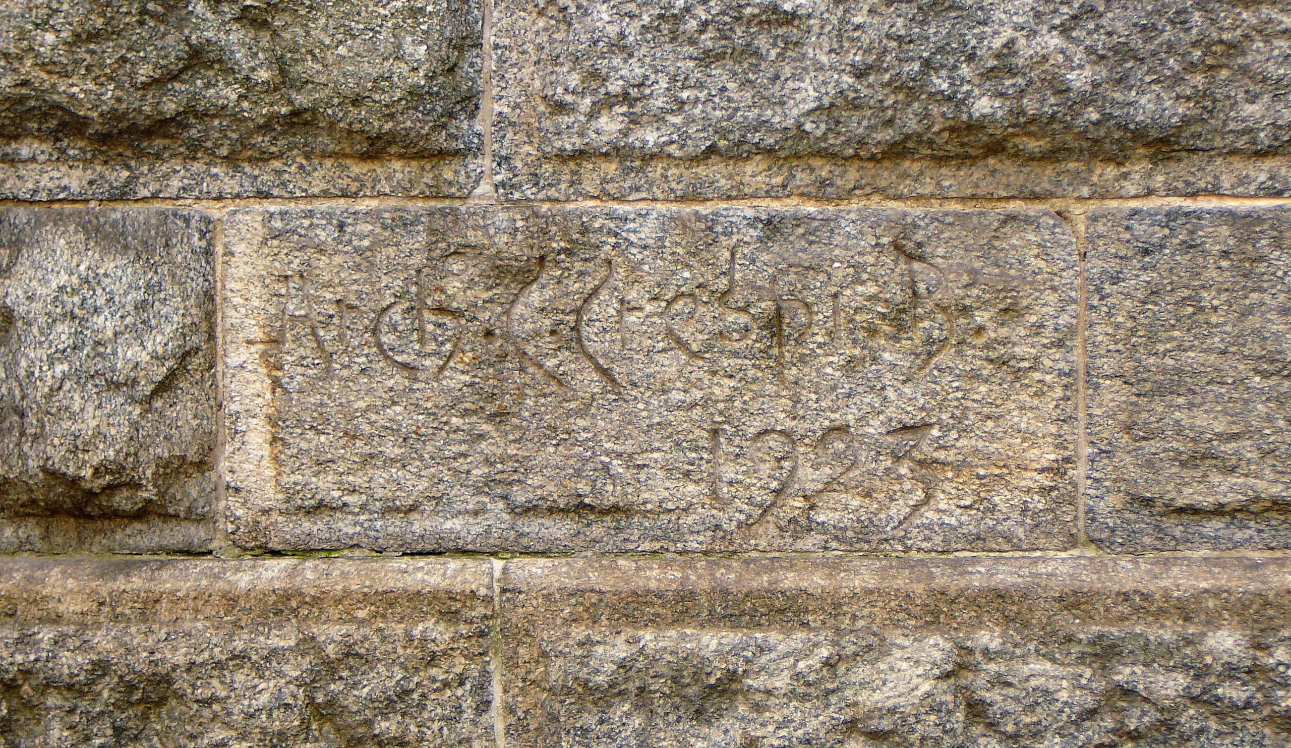 Arch. Camillo Crespi Balbi 1923 - progettista anche delle tre ville Ottolini in Busto Arsizio